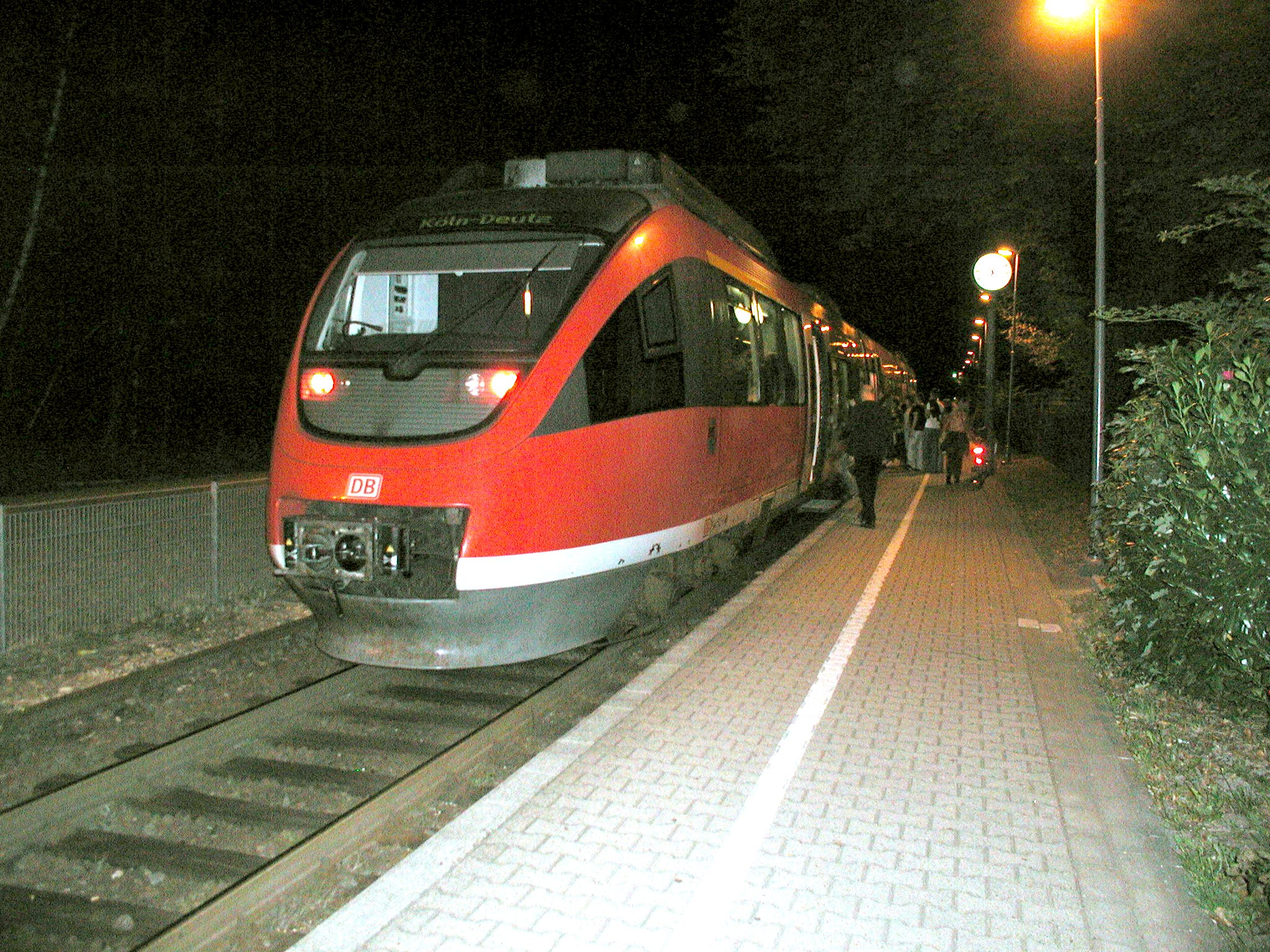 Ein Zug am Bahnhof Kierberg (provisorischer Bahnsteig vor Einrichtung des Mittelbahnsteigs). Bahnstation Kaiserbahnhof, Brühl-Kierberg, heute. Kierberg ►.